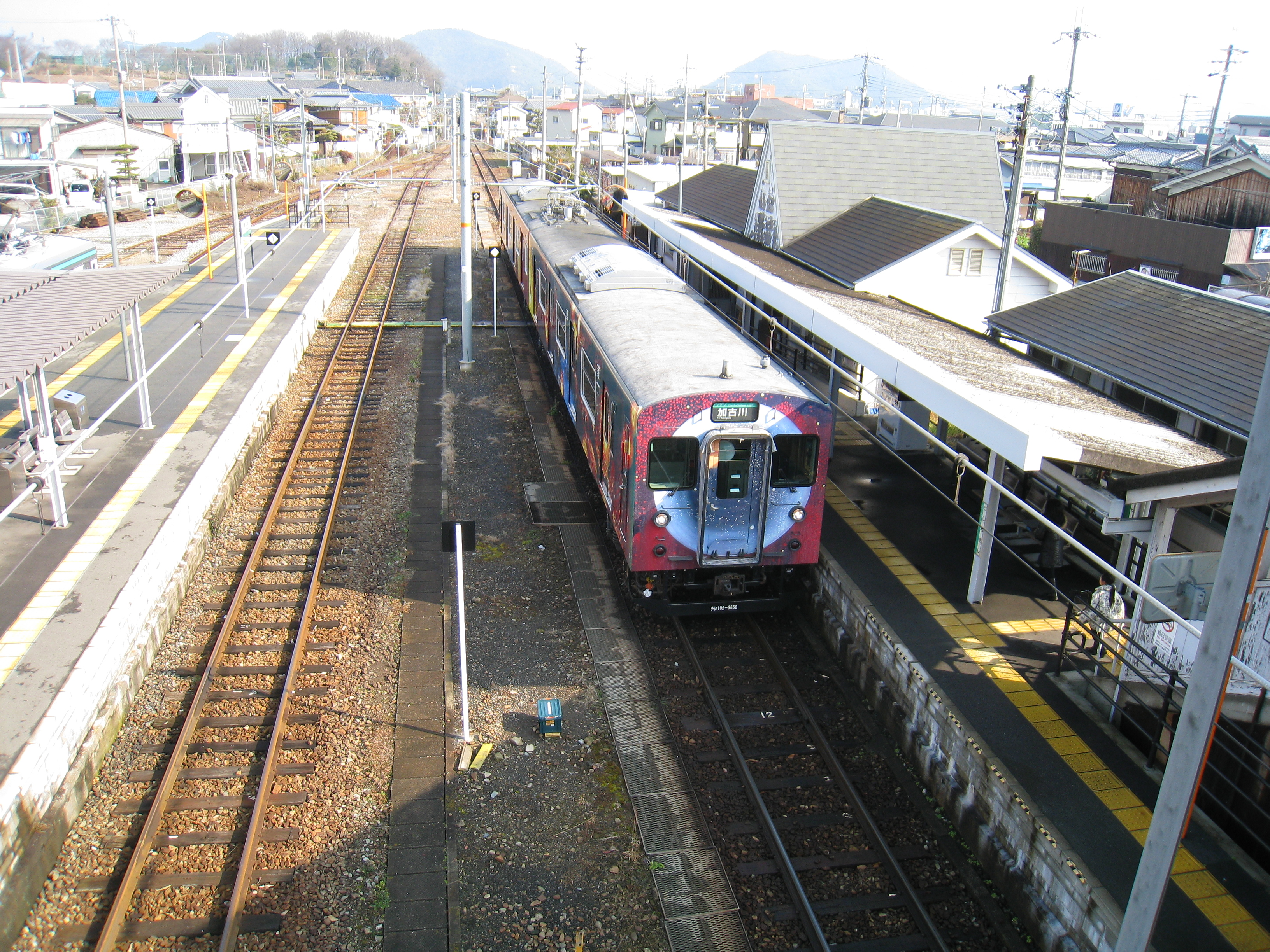 JR加古川線西脇市駅